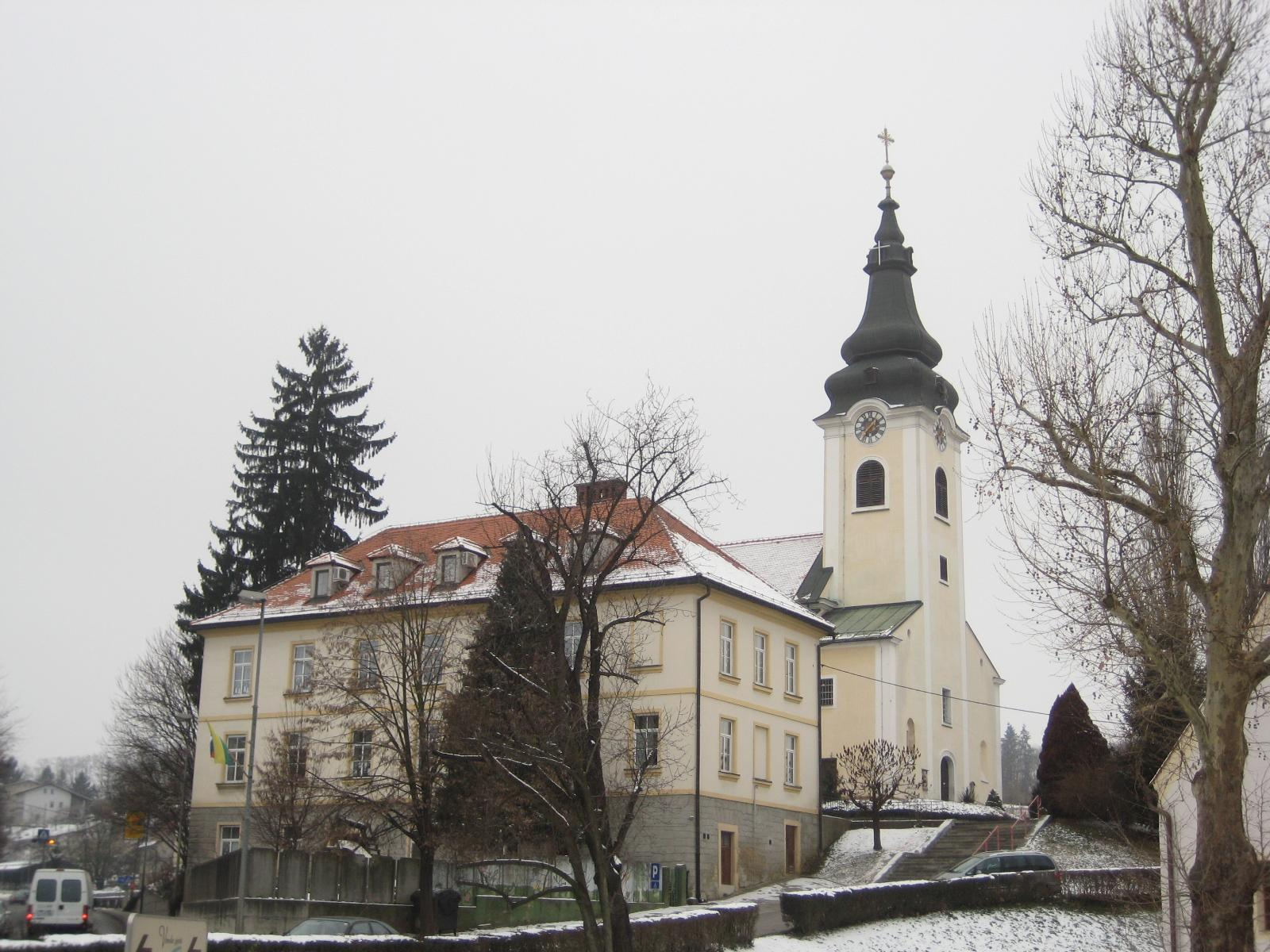 Gornja Radgona, town in Slovenia